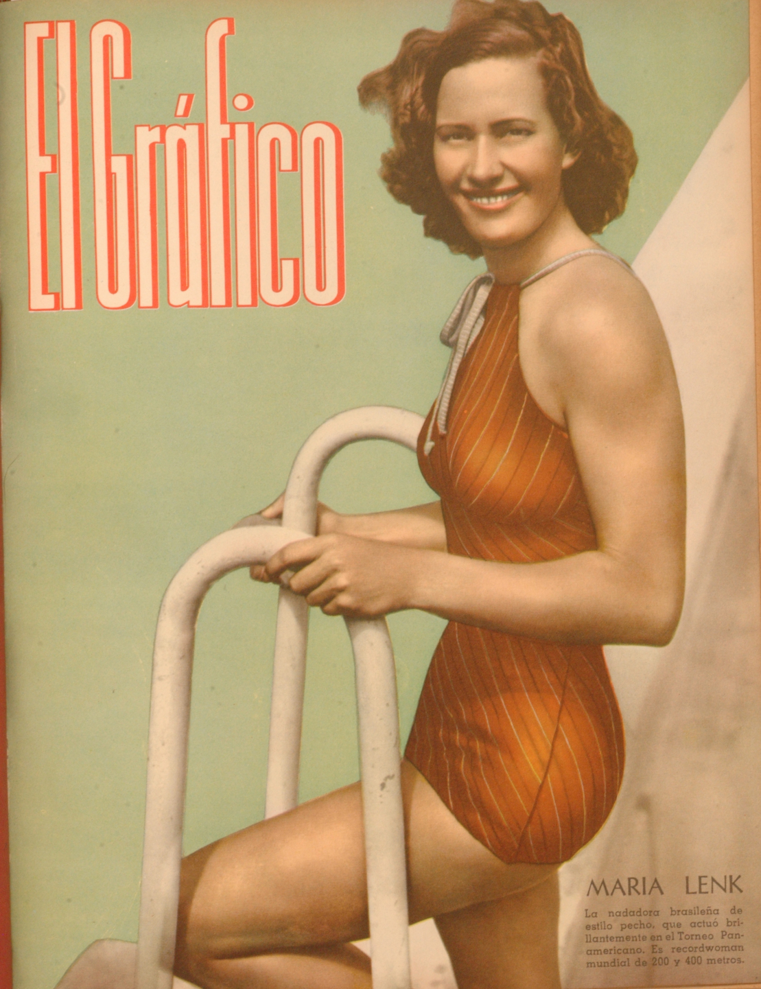 El Grafico del 09 de Febrero de 1940. Edicion 1074